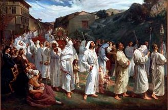 Procession des Pénitents blancs, 122 x 171 cm, Museon Arlaten